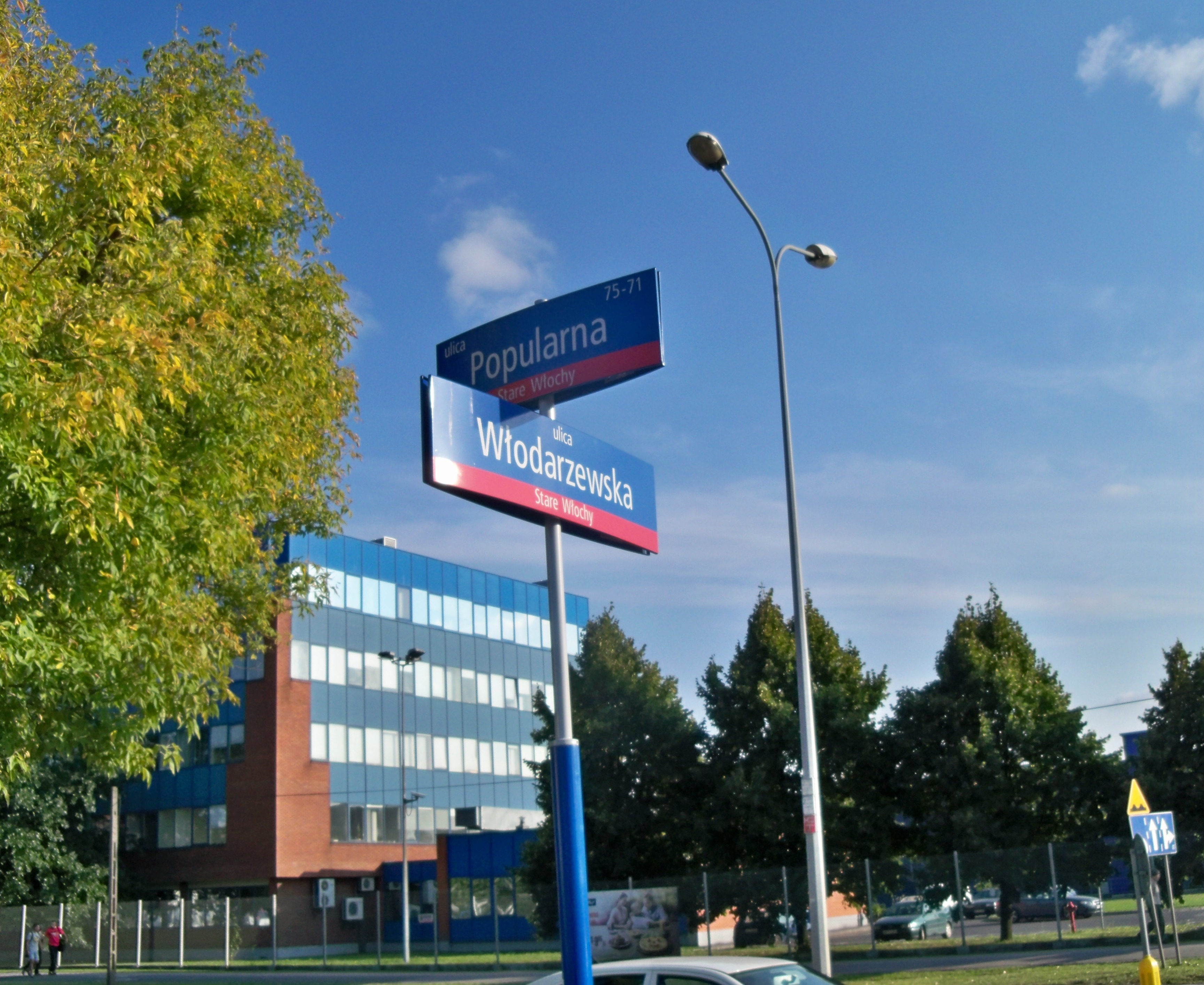 Skrzyżowanie ulicy Popularnej i włochowskiego odcinka Włodarzewskiej (Wiktoryn) w Warszawie